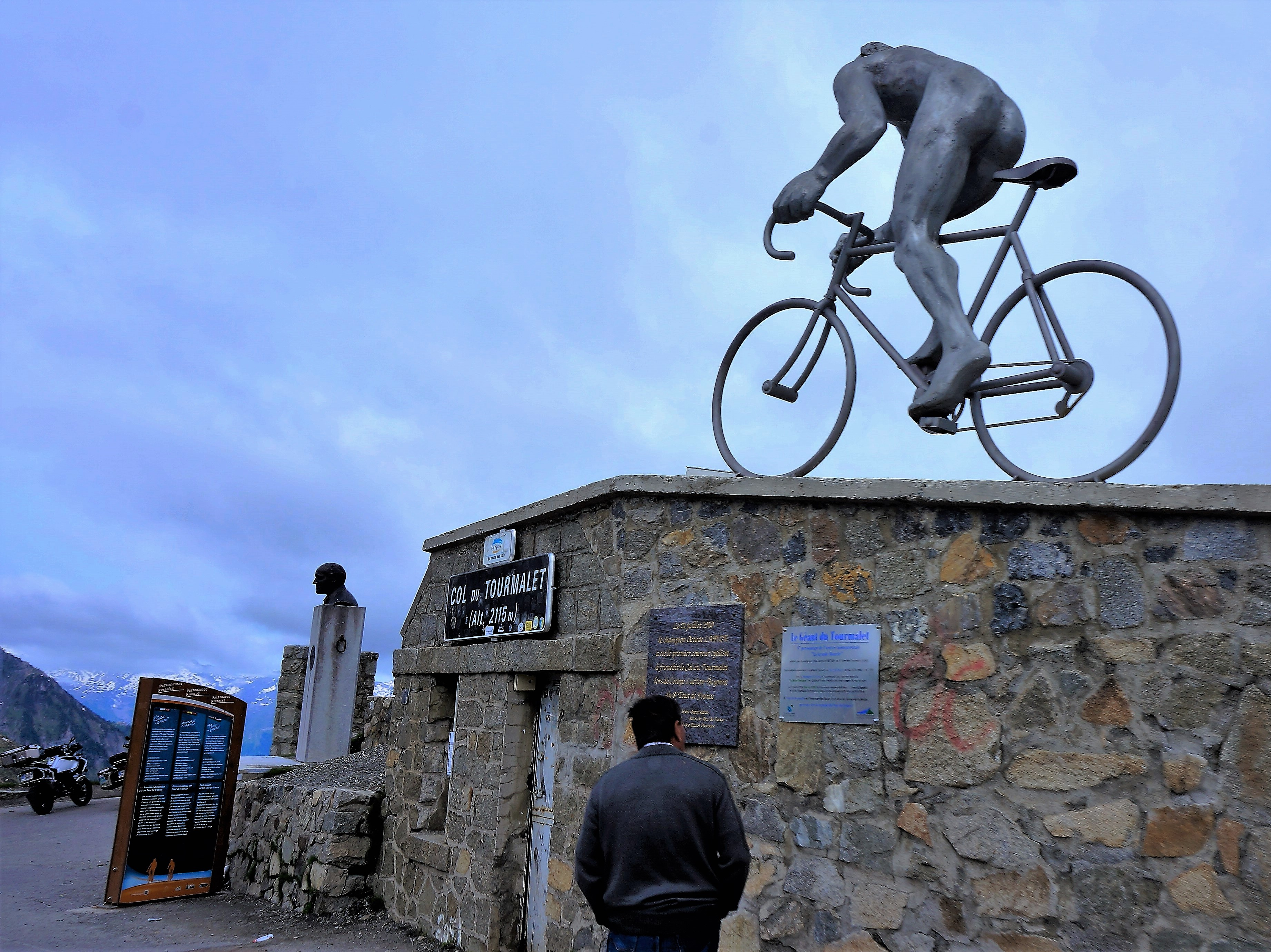 Col du Tourmalet